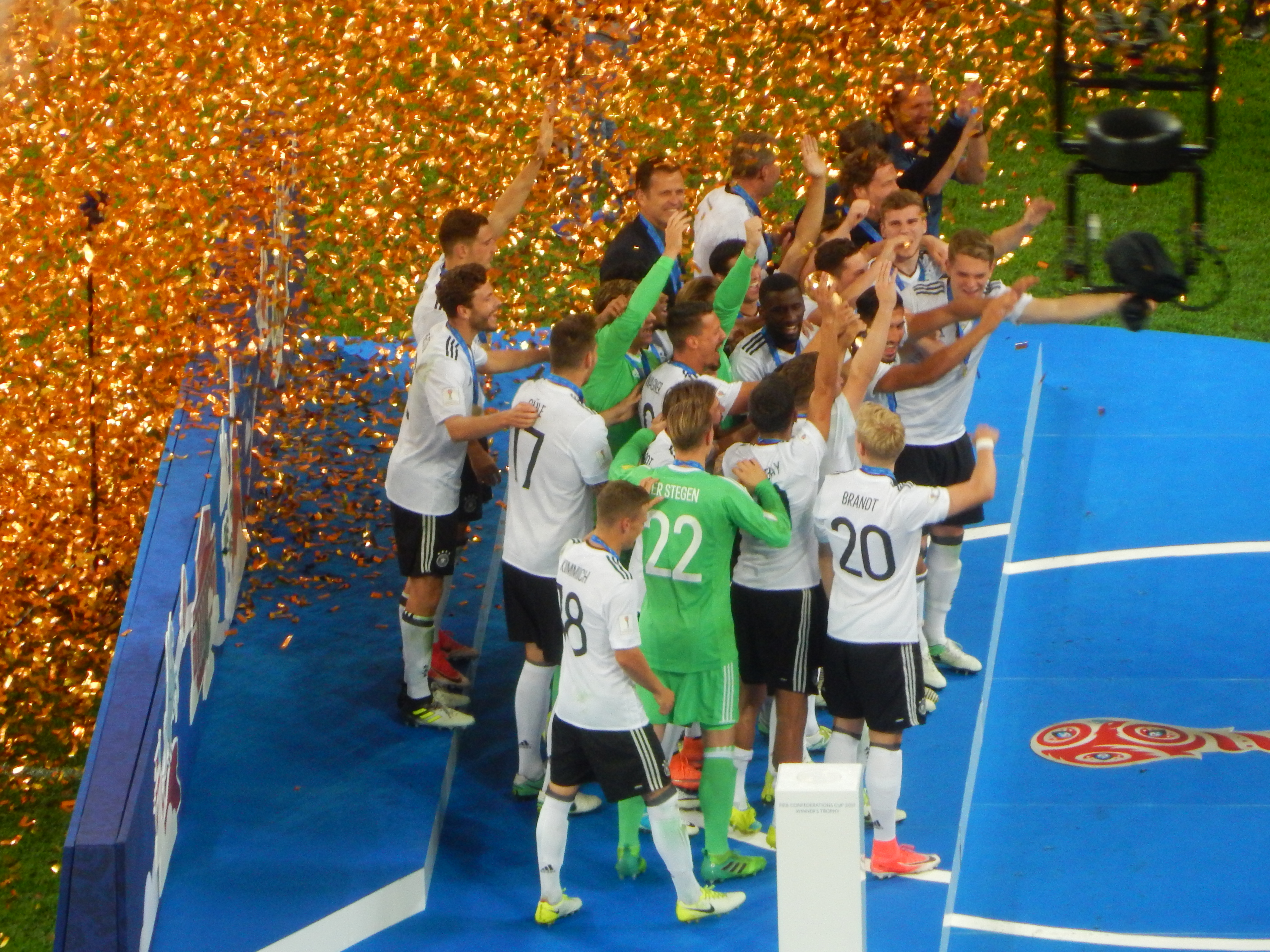 Финал Кубка конфедераций 2017